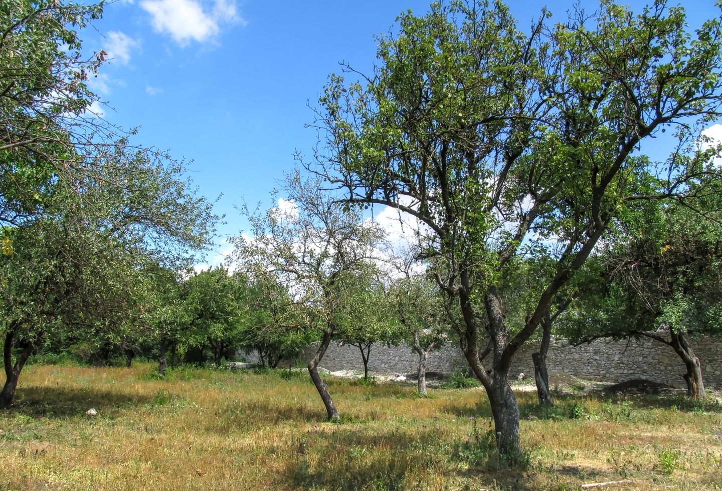 Иванчский парк, монумент природы, находится в Орхейский район, с. Иванча (код MD-OR-map-017)